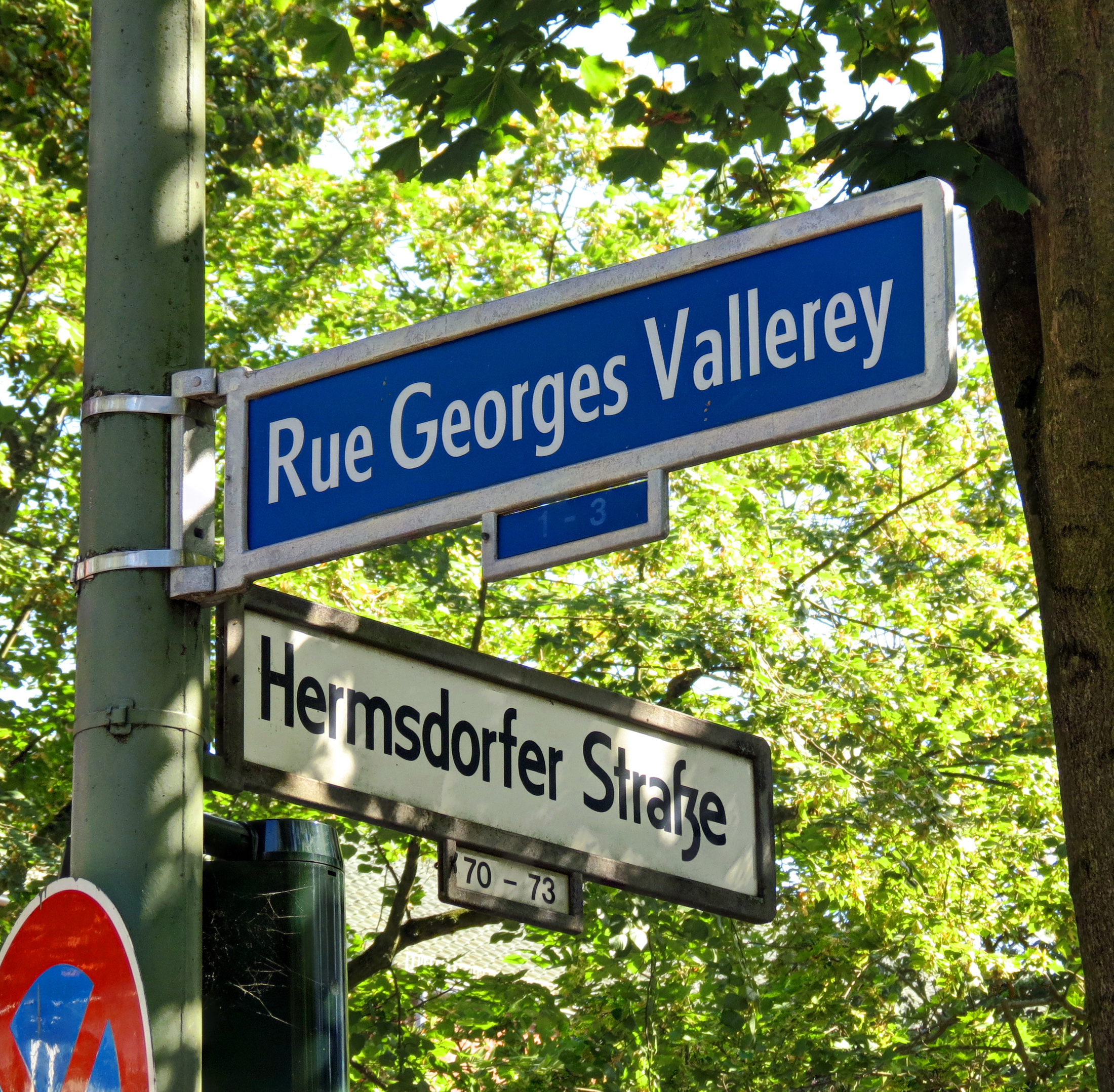 Französisches Straßeschild in der frenz. Alliiertensiedlung Cité Foch in Berlin-Wittenau. Rue Georges Vallery / Hermsdorfer Straße.